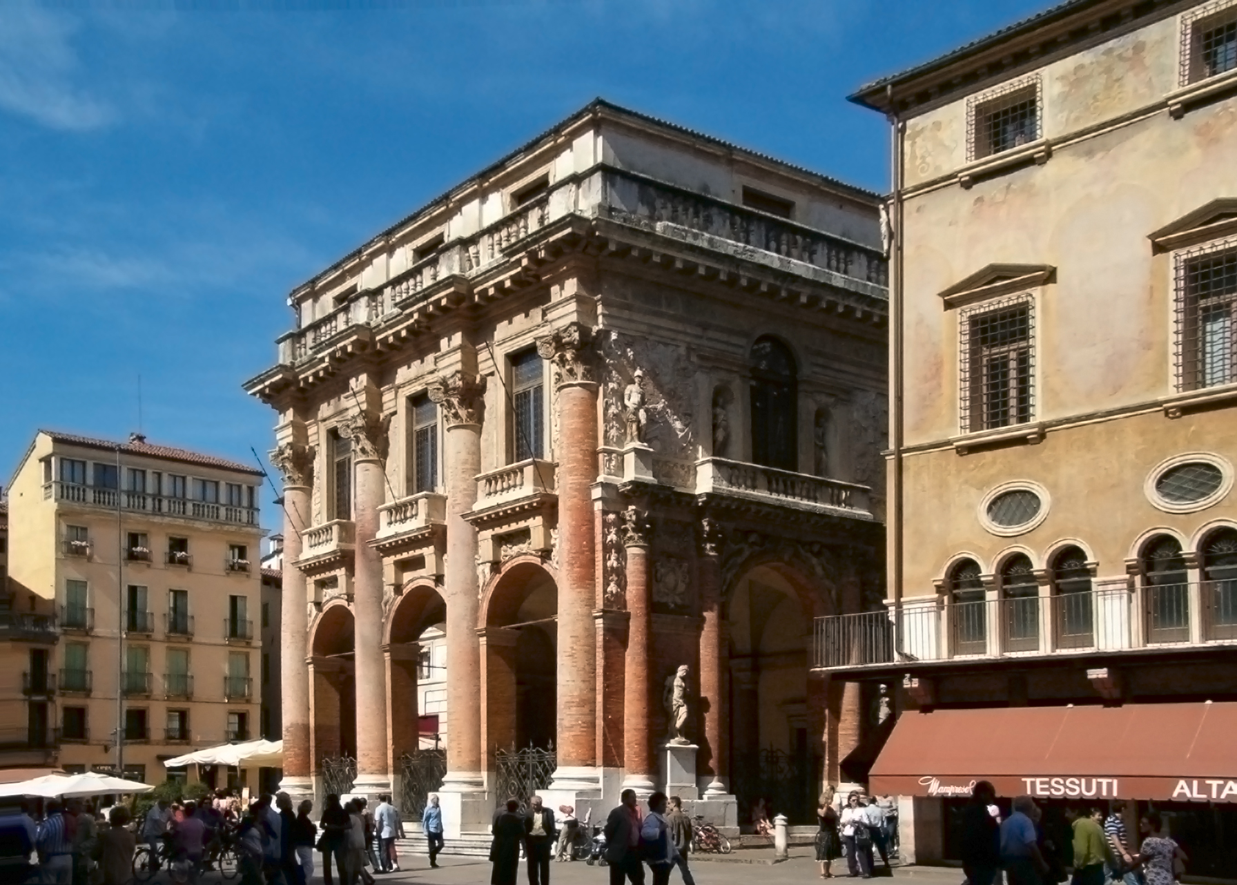 Palazzo del Capitanio, Vicenza. Arch. Andrea Palladio (1565)